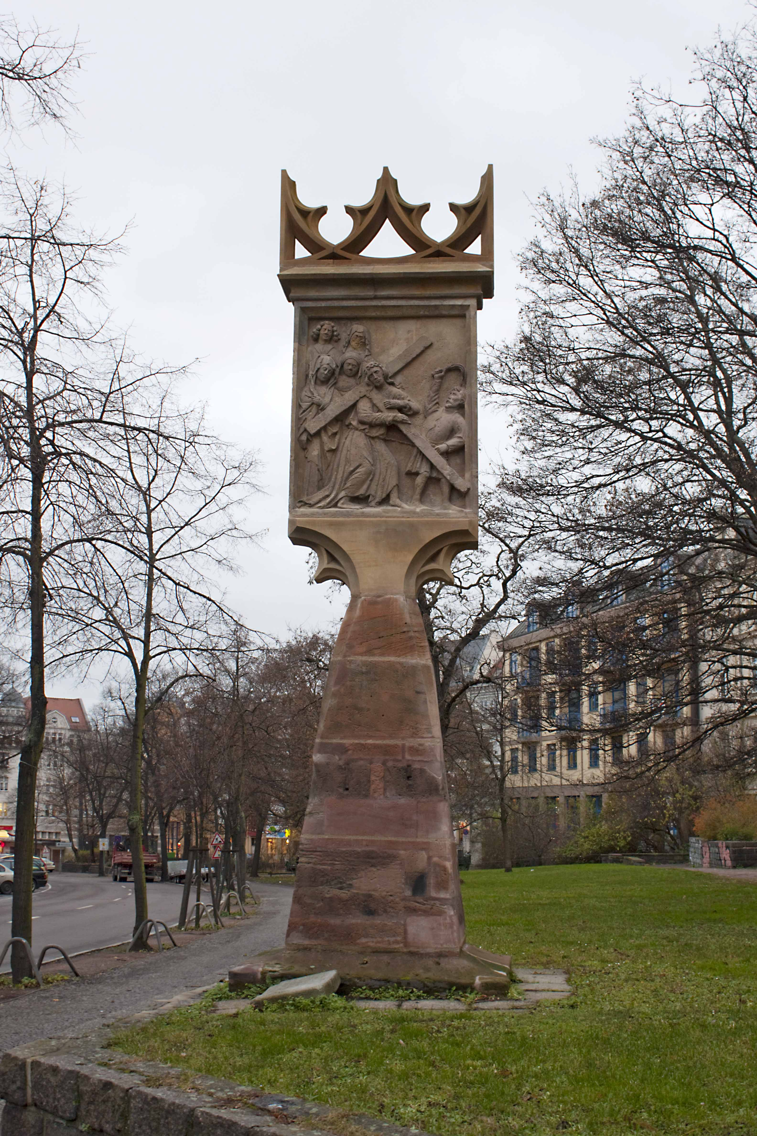 Betsäule am Universitätsring in Halle